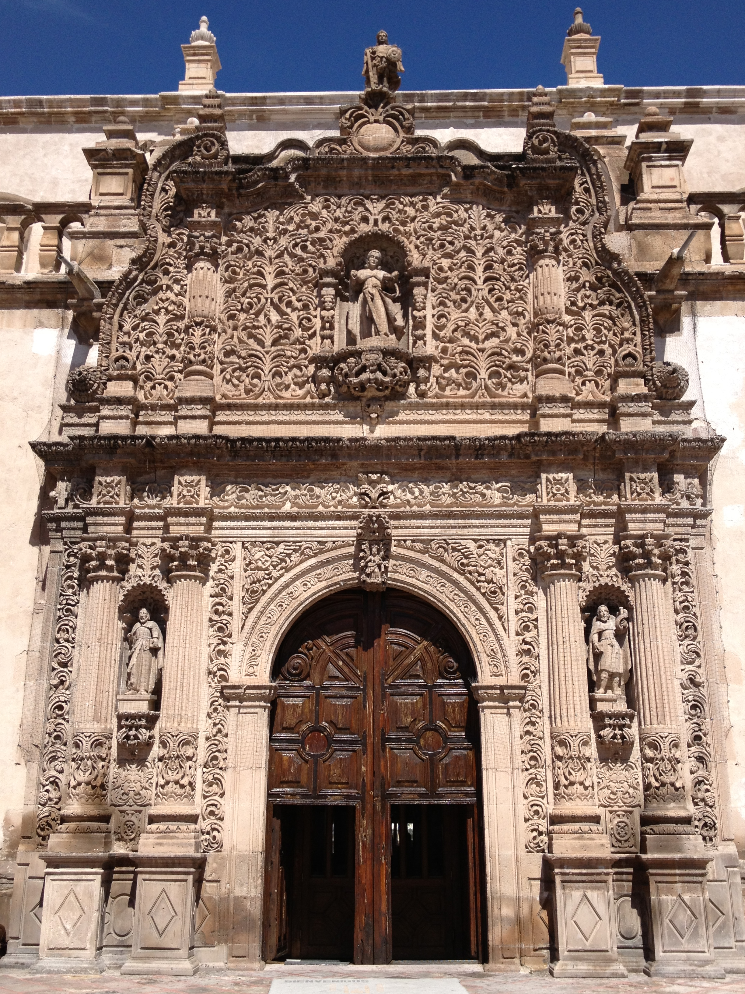 Fachada lateral sur de la Catedral de Chihuahua